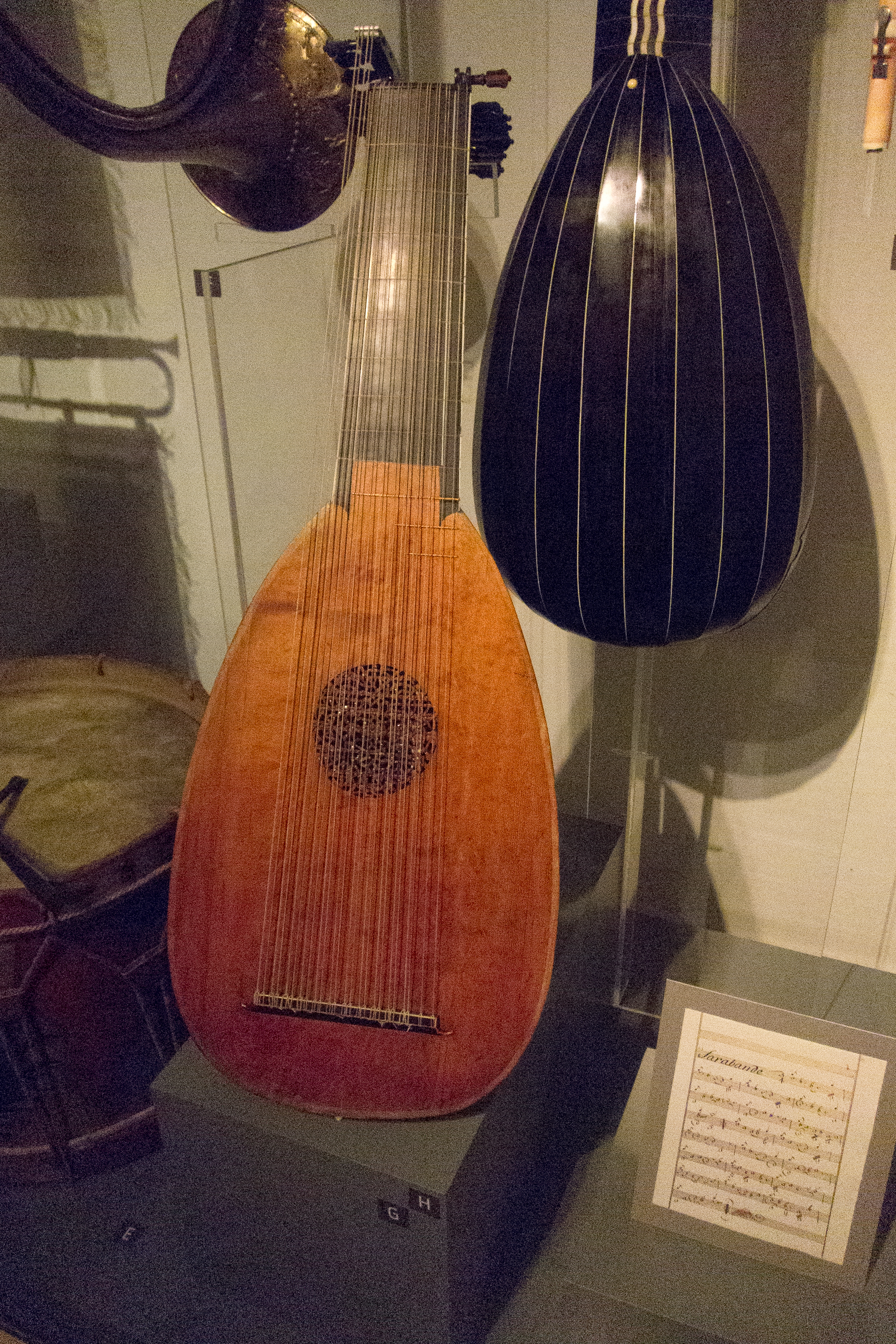 13 courses Baroque lute, Thomas Edlinger d. J., Augsburg, 1722 “Lutes, Leipzig 2012” References ULEI:M0000495 Laute, Museum für Musikinstrumente der Universität Leipzig, Inventory number 497. MIMO (musical instrument museums online). "Thomas Edlinger d. J., Augsburg 1722”, “13chörige Barocklaute aus Ebenholz, mit abgewinkeltem Wirbelkasten. Der Hals wurde mit einem wellenförmigen Banddekor, der Wirbelkasten mit einer ausgesägten (à jour) Elfenbeinplatte versehen.Die Laute stellt den neuen Typus der Barocklaute mit dem erweiterten Tonvorrat zum Bass dar, der sich in dieser Form - die tiefen Saiten werden über einen sog. Bassreiter geführt - in größerer Zahl nach 1720 nachweisen lässt.”, “Edlinger soll auf Anraten von Silvius Leopold Weiss (1686-1750, Komponist und Hoflautenist in Dresden) die ersten dreizehnchörigen Lauten gebaut haben." Georg Kinsky: Musikhistorisches Museum von Wilhelm Heyer in Cöln, Bd. 2, Köln 1912, S. 94. Eszter Fontana: Lutes for the Prince? The Edlinger Lutes in Leipzig and Frankfurt am Main. In: Journal of the Lute society of America, XXXV. (2002) 74-101.